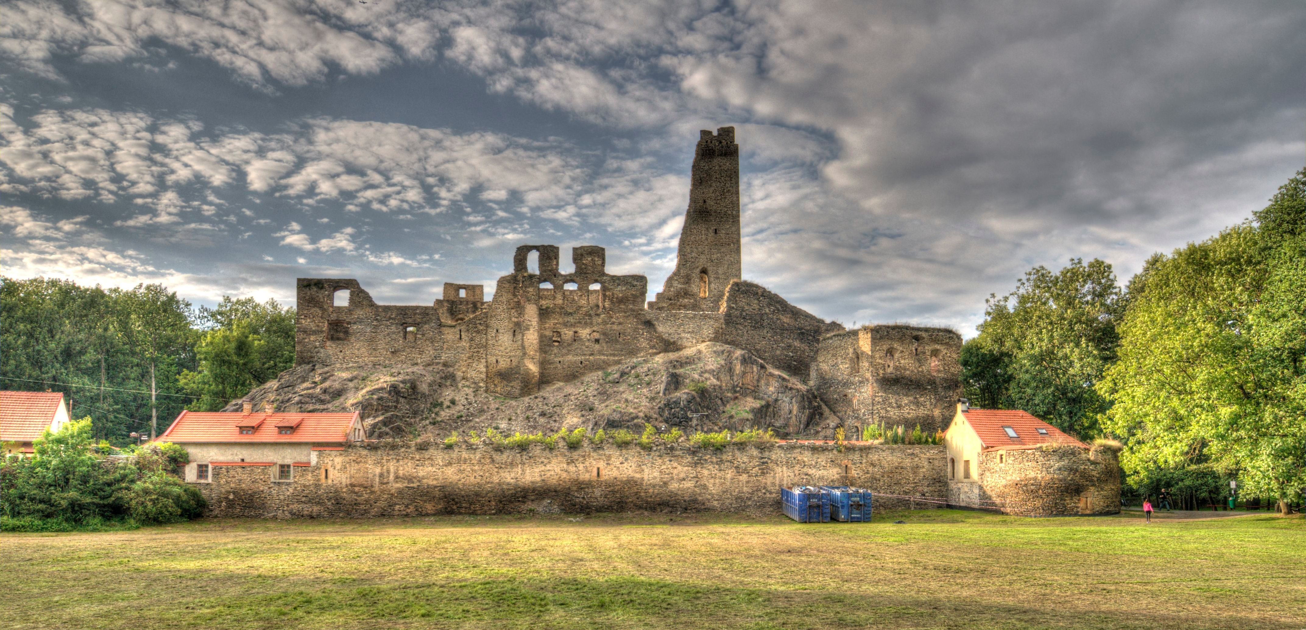 Celkový pohled na hrad od jihu